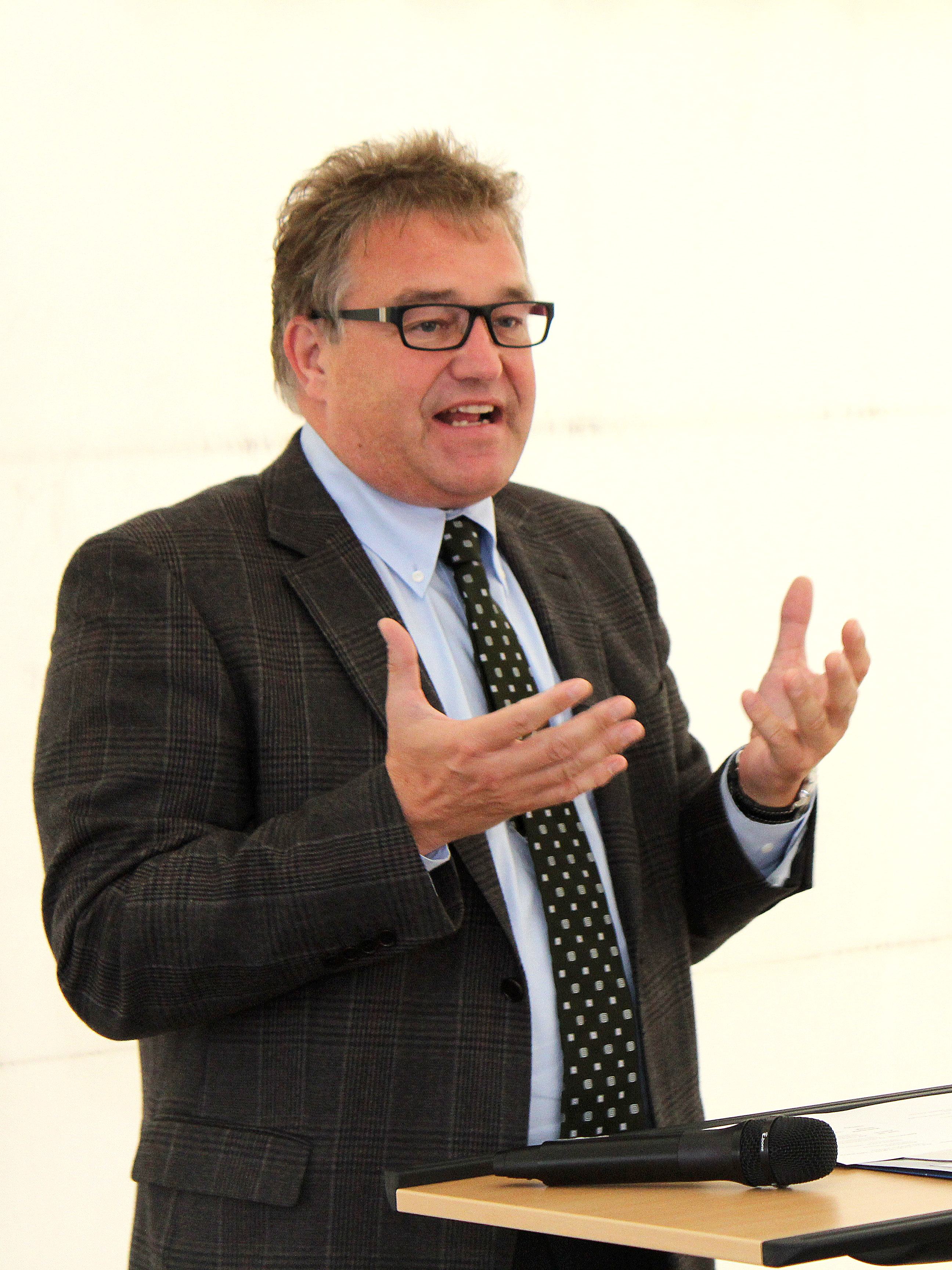 Hauke Jagau beim 40-jährigen Geburtstag des paritätischen Kinderzentrums in Holtensen/Wennigsen, 2011